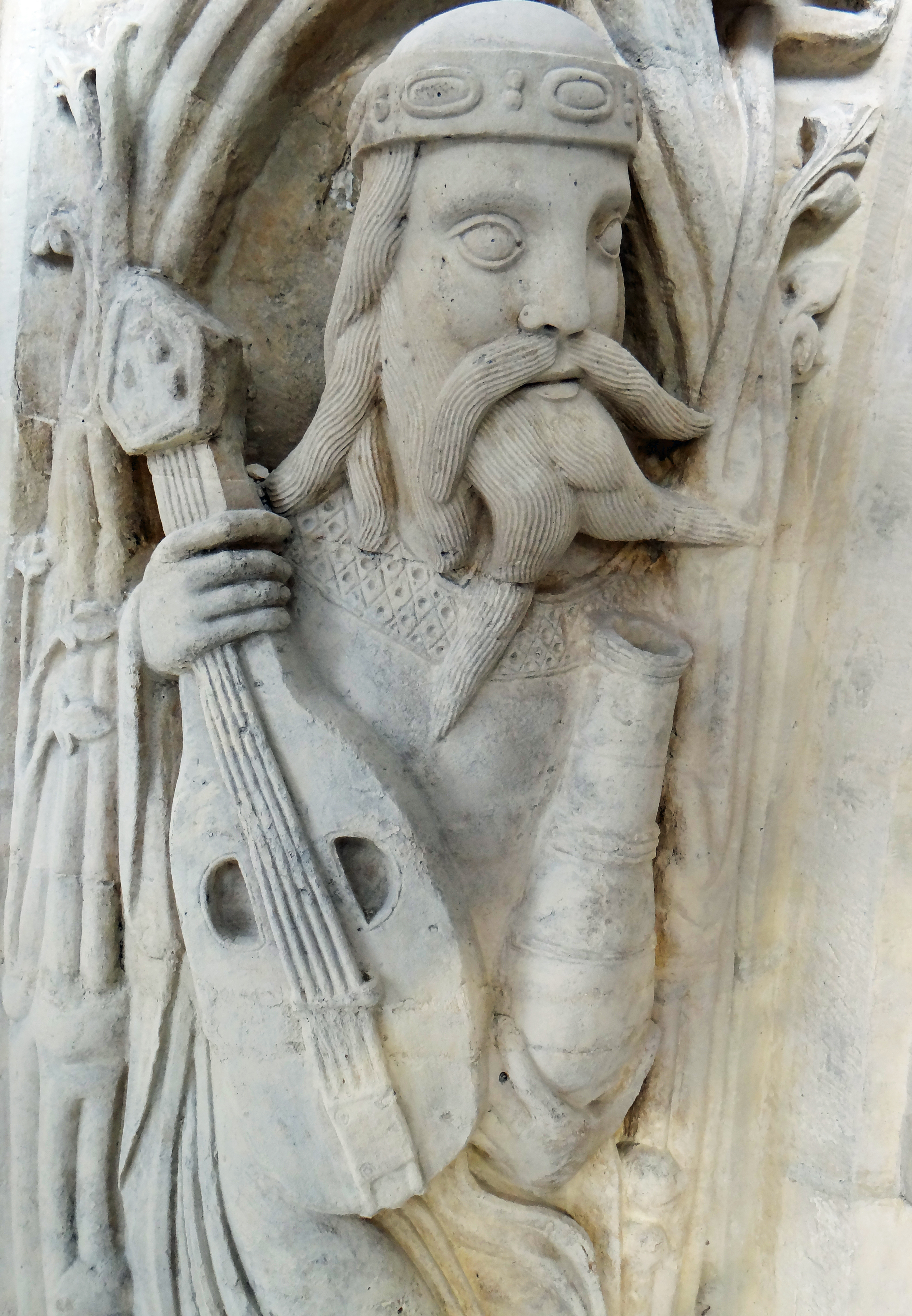 Saint-Denis - Basilique Saint-Denis - Portail central restauré par le sculpteurJoseph Brun - Voussure avec un vieillard de l'Apocalypse avec une tête refaite par Joseph Brun